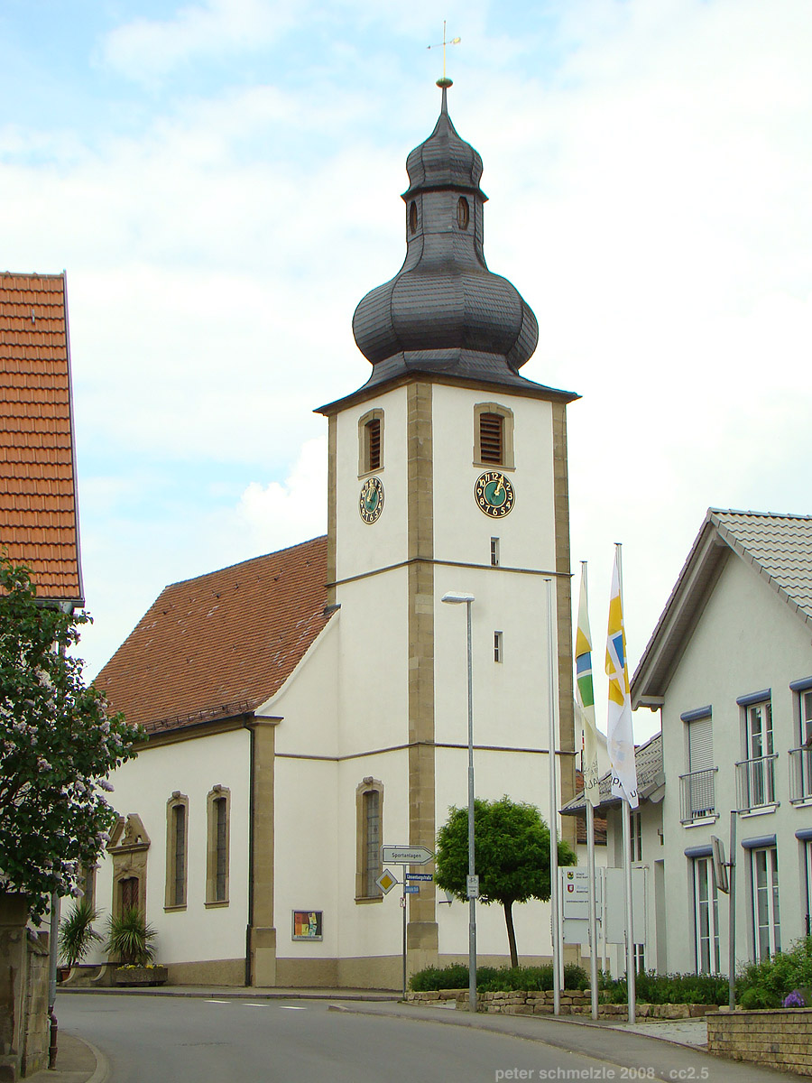 Kirche in Babstadt, erbaut 1738, erneuert 1909